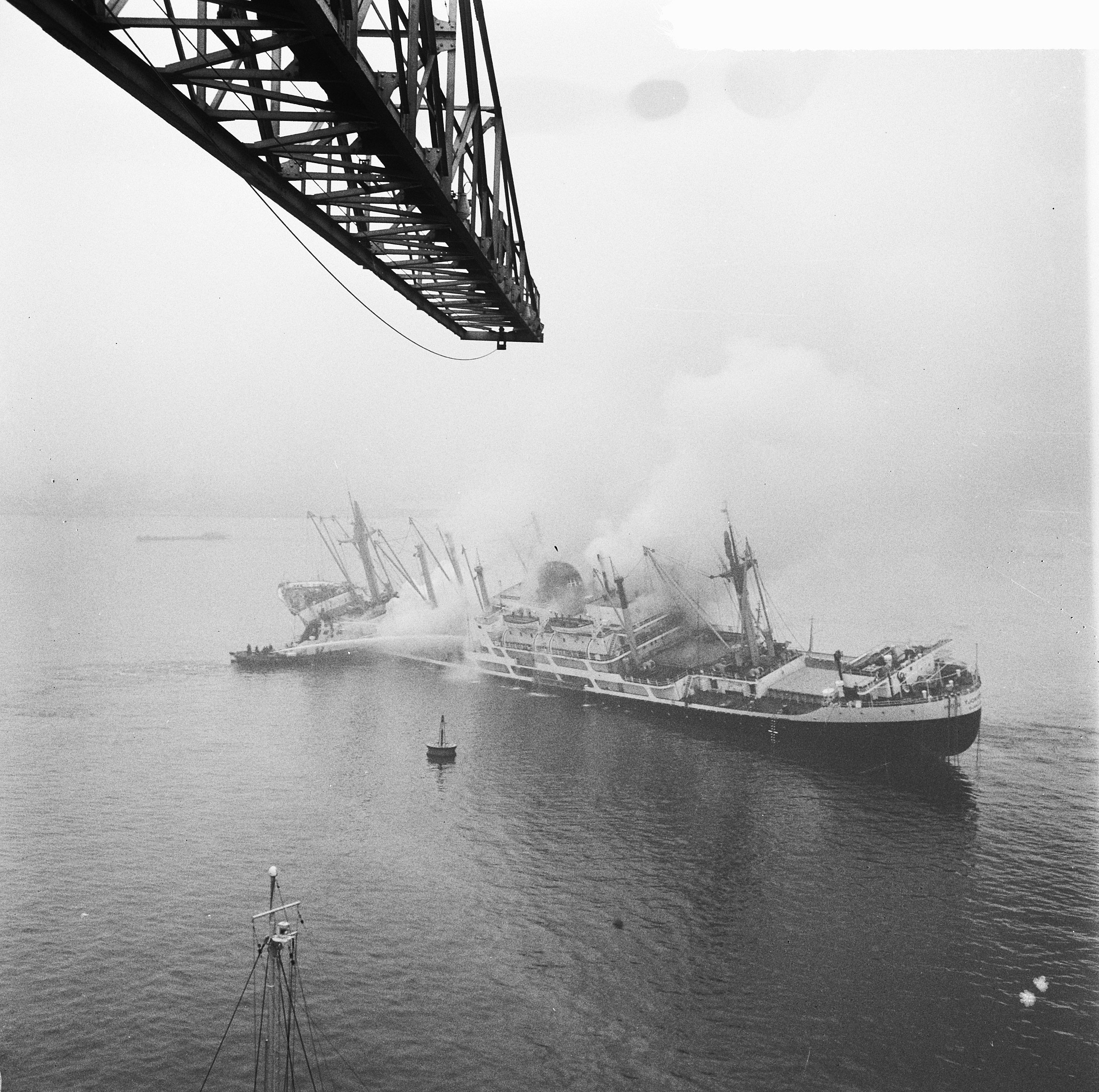 Collectie / Archief : Fotocollectie Anefo Reportage / Serie : [ onbekend ] Beschrijving : Indonesische vrachtschip "Tjokroaminoto" in brand in Amsterdamse haven, blussingswerkzaamheden Datum : 29 oktober 1964 Trefwoorden : bluswerkzaamheden, branden, havens Fotograaf : Nijs, Jac. de / Anefo Auteursrechthebbende : Nationaal Archief Materiaalsoort : Negatief (zwart/wit) Nummer archiefinventaris : bekijk toegang 2.24.01.03 Bestanddeelnummer : 917-0728